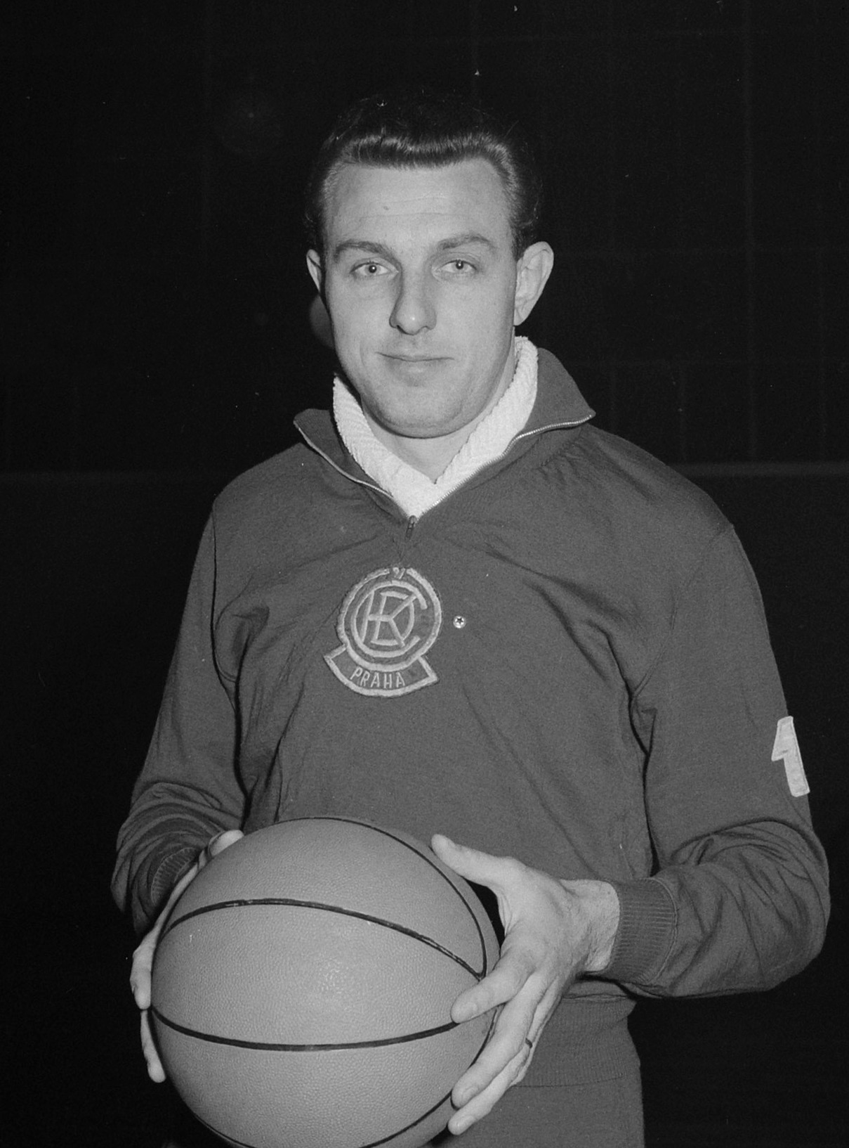 Basketbalwedstrijd om Europa, Wolves tegen Spartak, beroemd Tsjechische speler Baumiuk